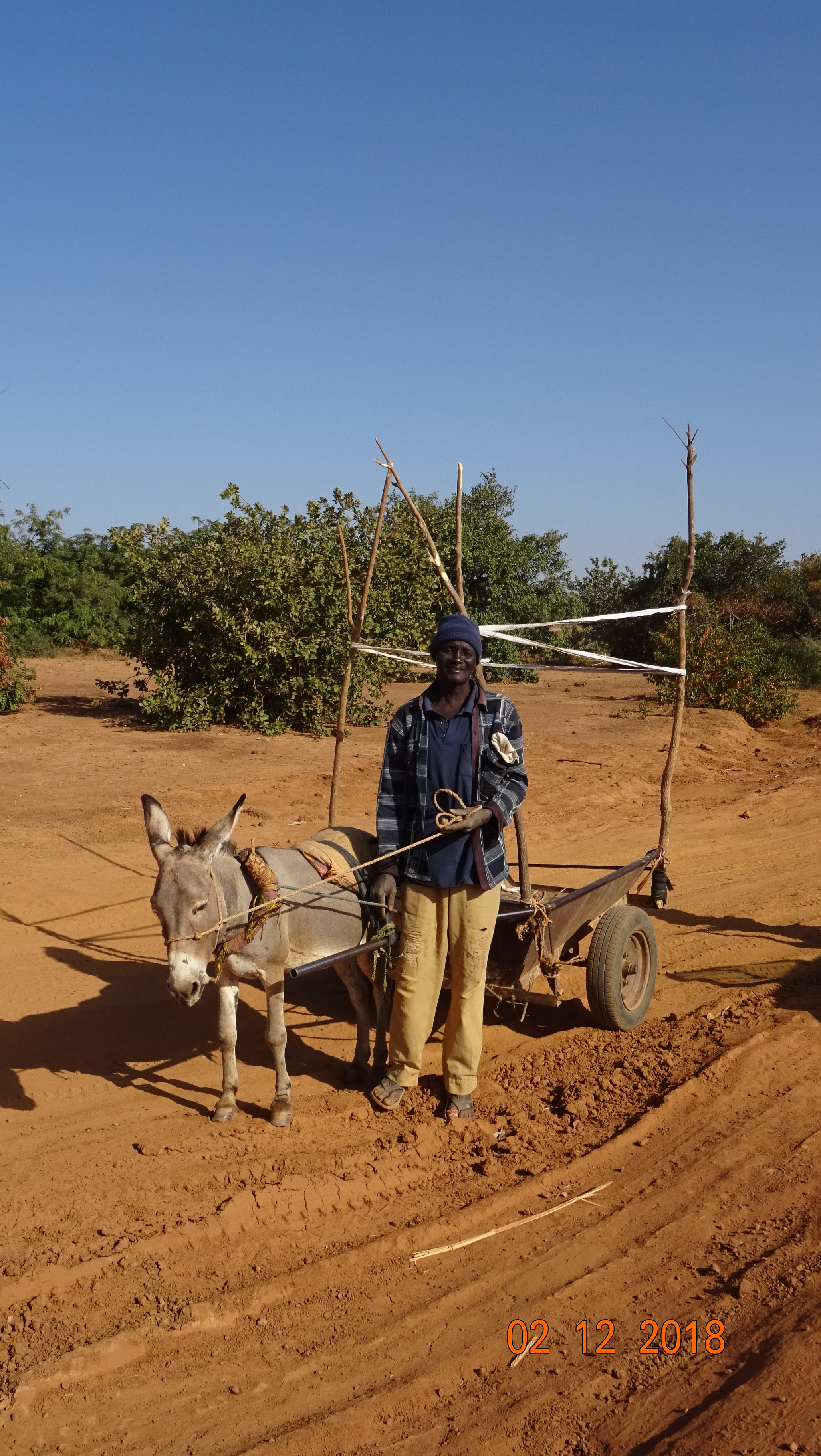 Burkina Faso - Guibaré - Homme et sa charrette tirée par un âne sur la piste Guibaré Sabsé This is an image with the theme "Africa on the Move or Transport" from: Burkina Faso